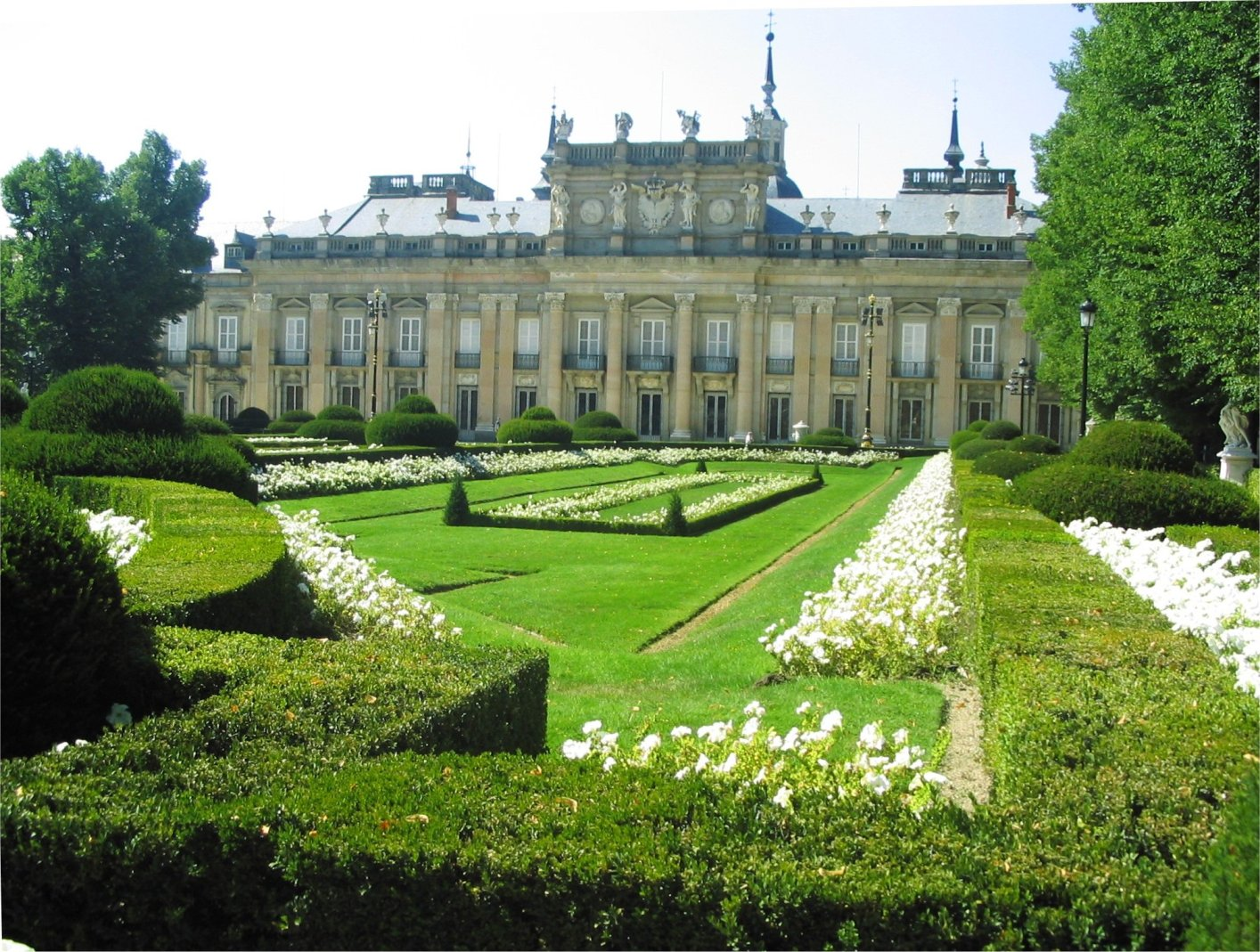 Palacio del Real Sitio de La Granja (Segovia), España.